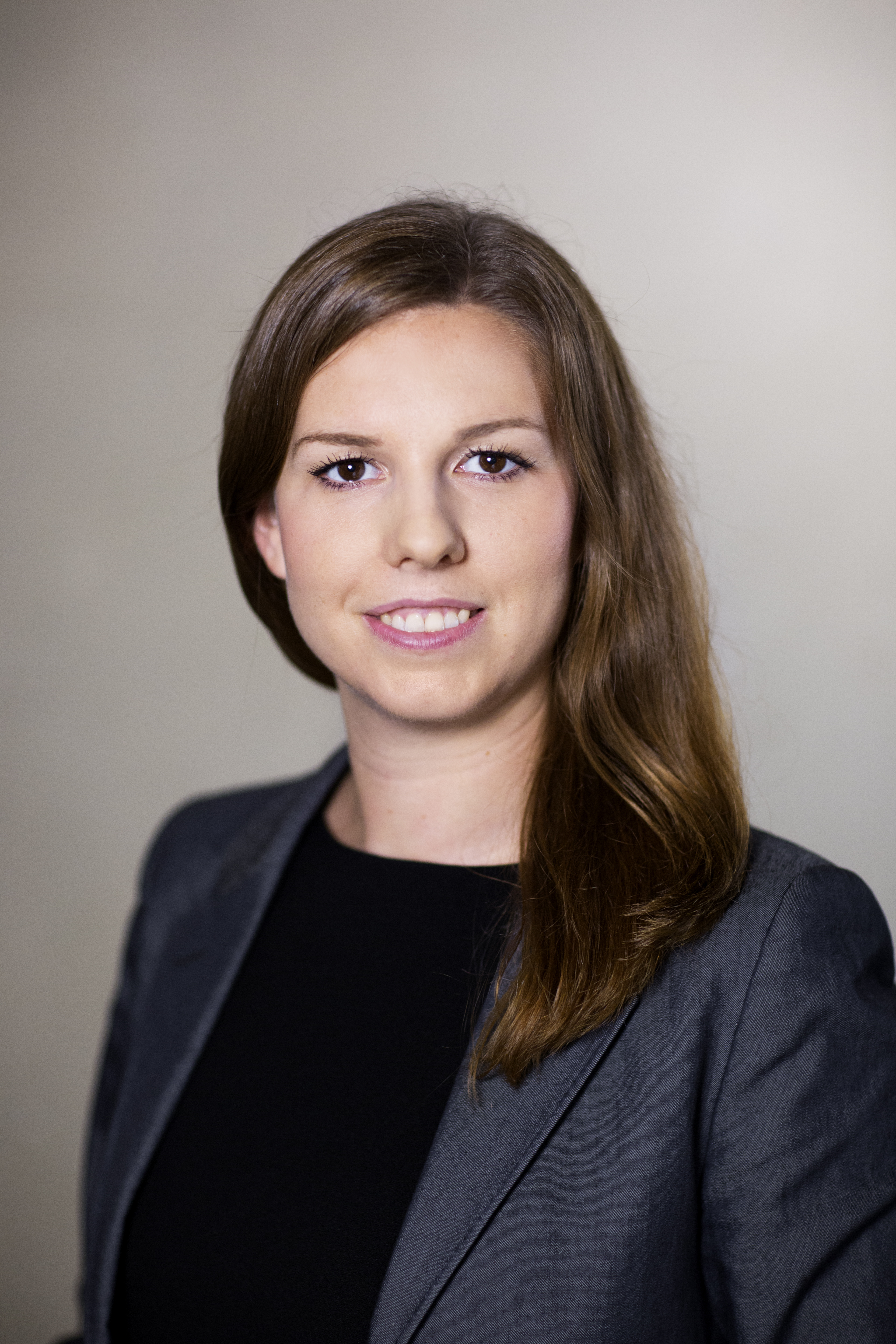 Emilia Bjuggren (S), arbetsmarknads- och idrottsborgarråd